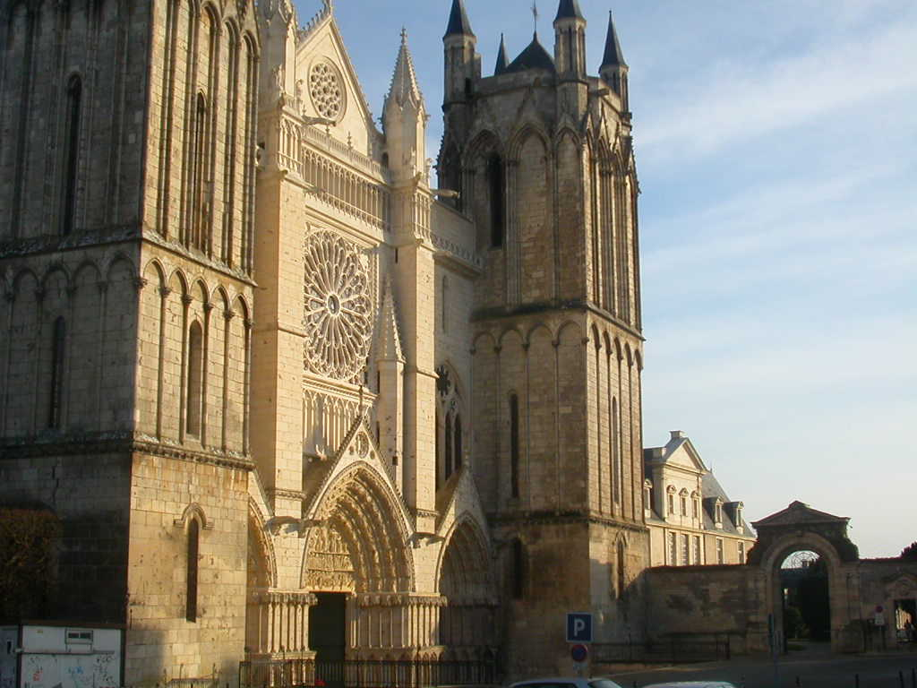 Cathédrale